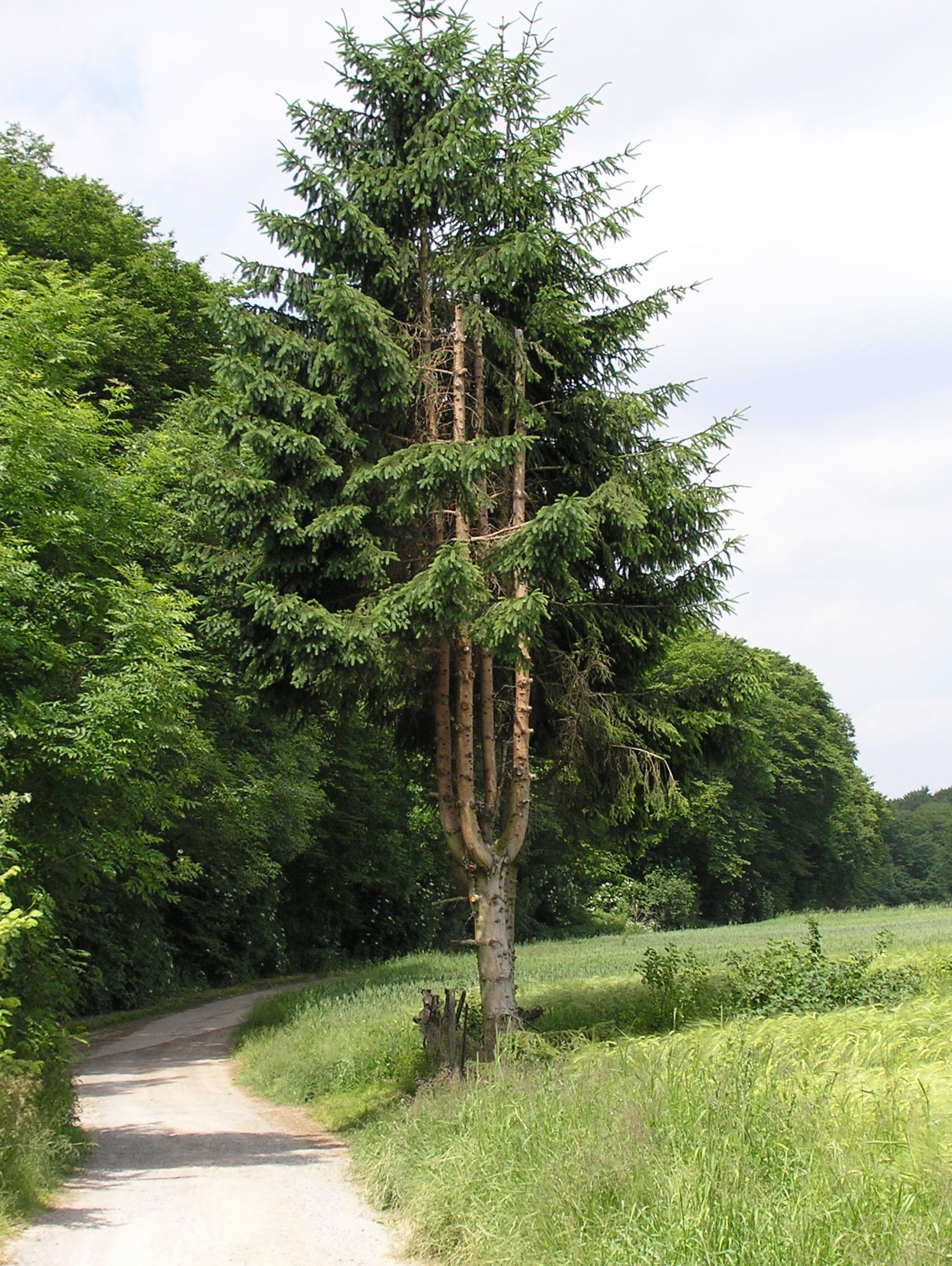 Zwiesel, Aichelberg